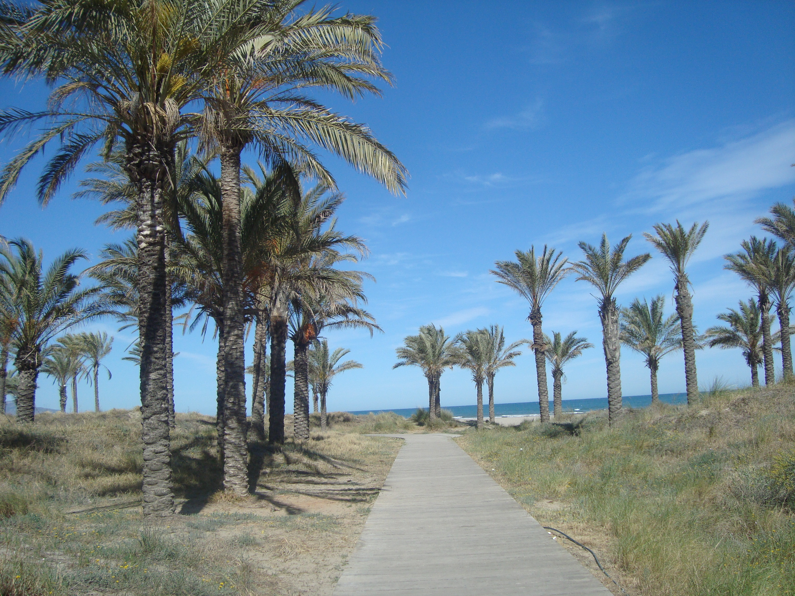 Platja del Pinar (Castelló de la Plana) This is a a photo of a beach in the Land of Valencia, Spain, with id: PL-1434